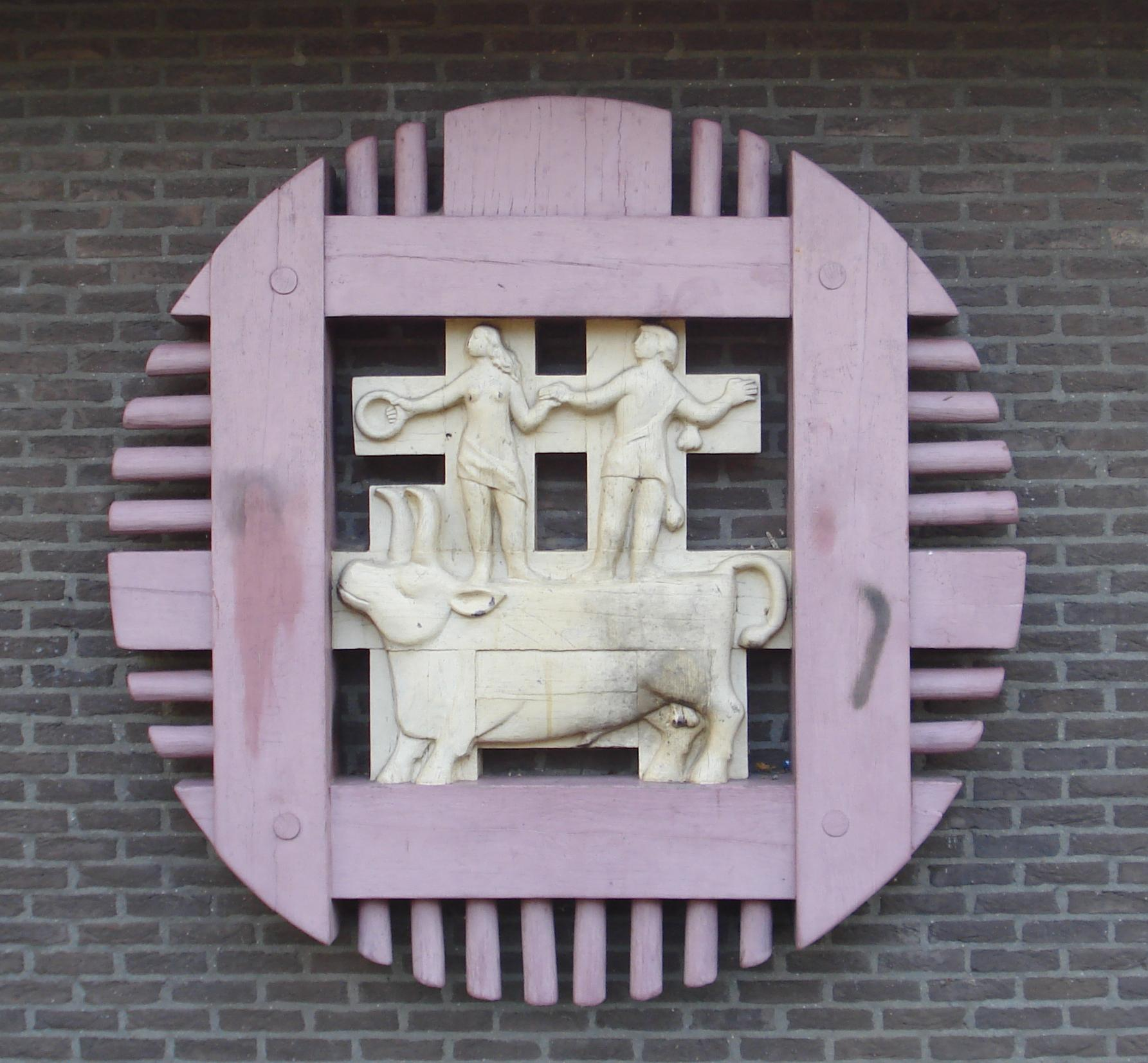 Soest, Paulus Potterlaan. Kunstwerk "Stier van Kreta" van Jan de Melker. Soest/The Netherlands. FOP.